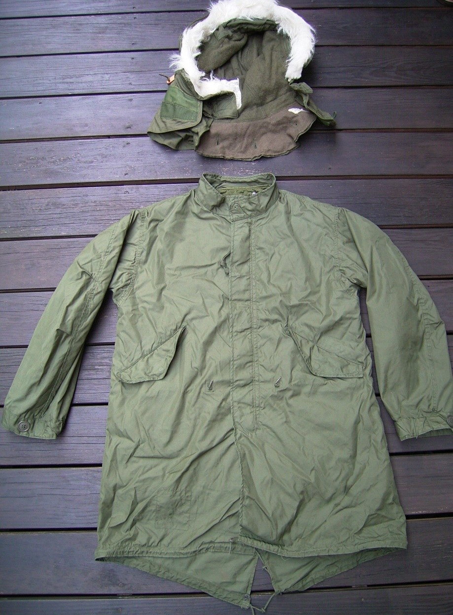 M-65パーカ本体とボタン留めするシンサティックフード